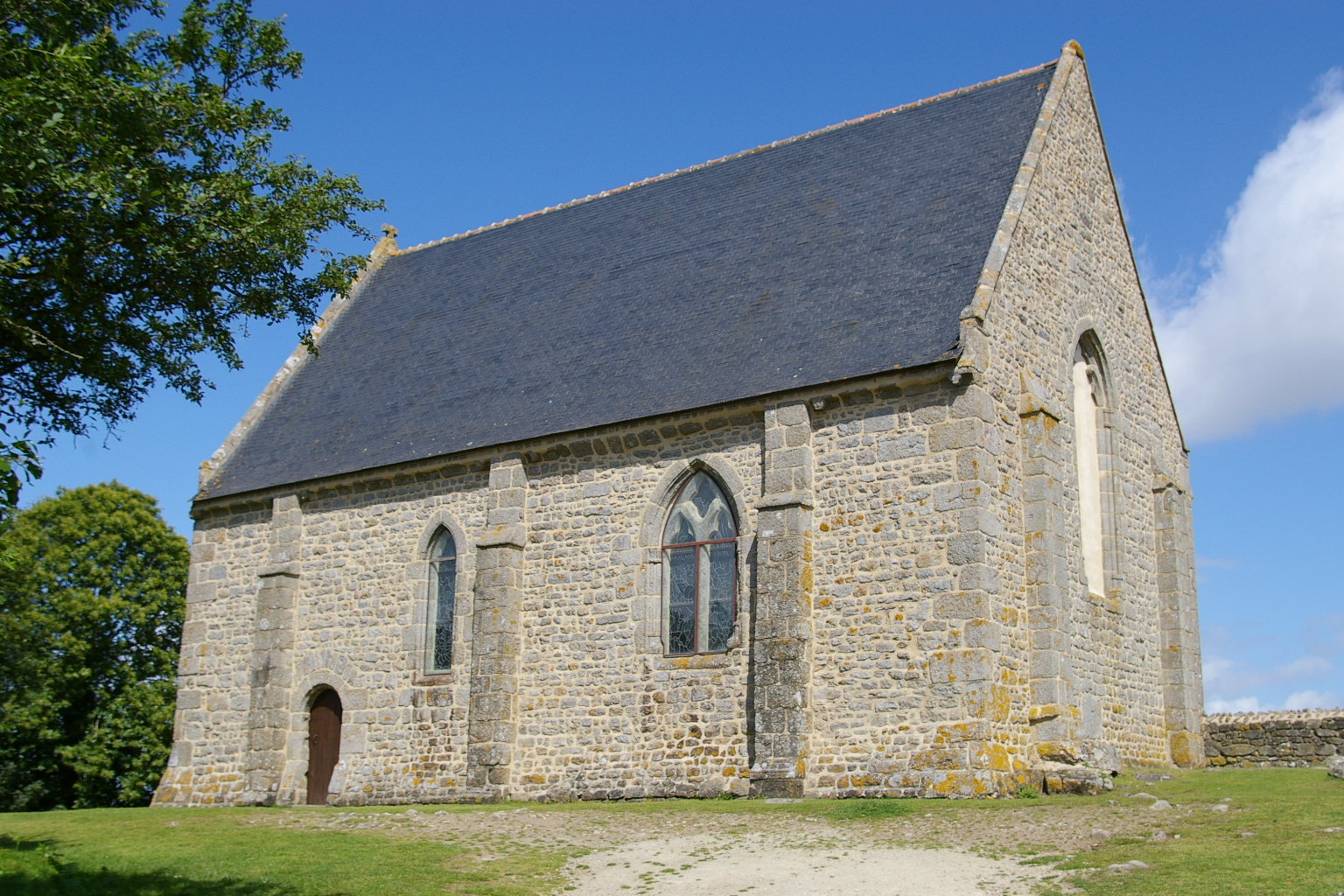 Chapelle du Montaigu à Hambers (53)